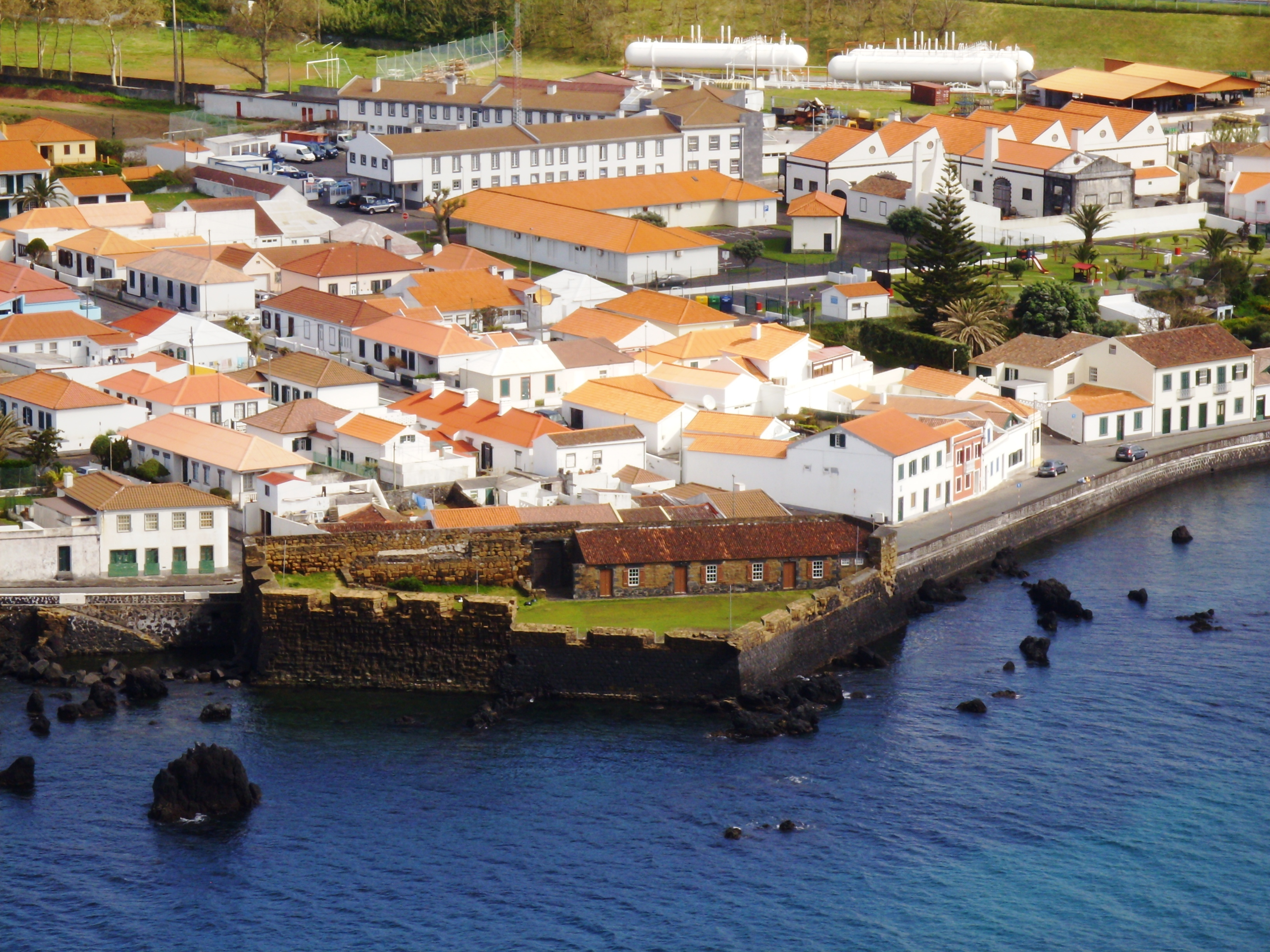 Forte de São Sebastião, freguesia das Angústias, cidade e concelho da Horta, ilha do Faial, Açores.